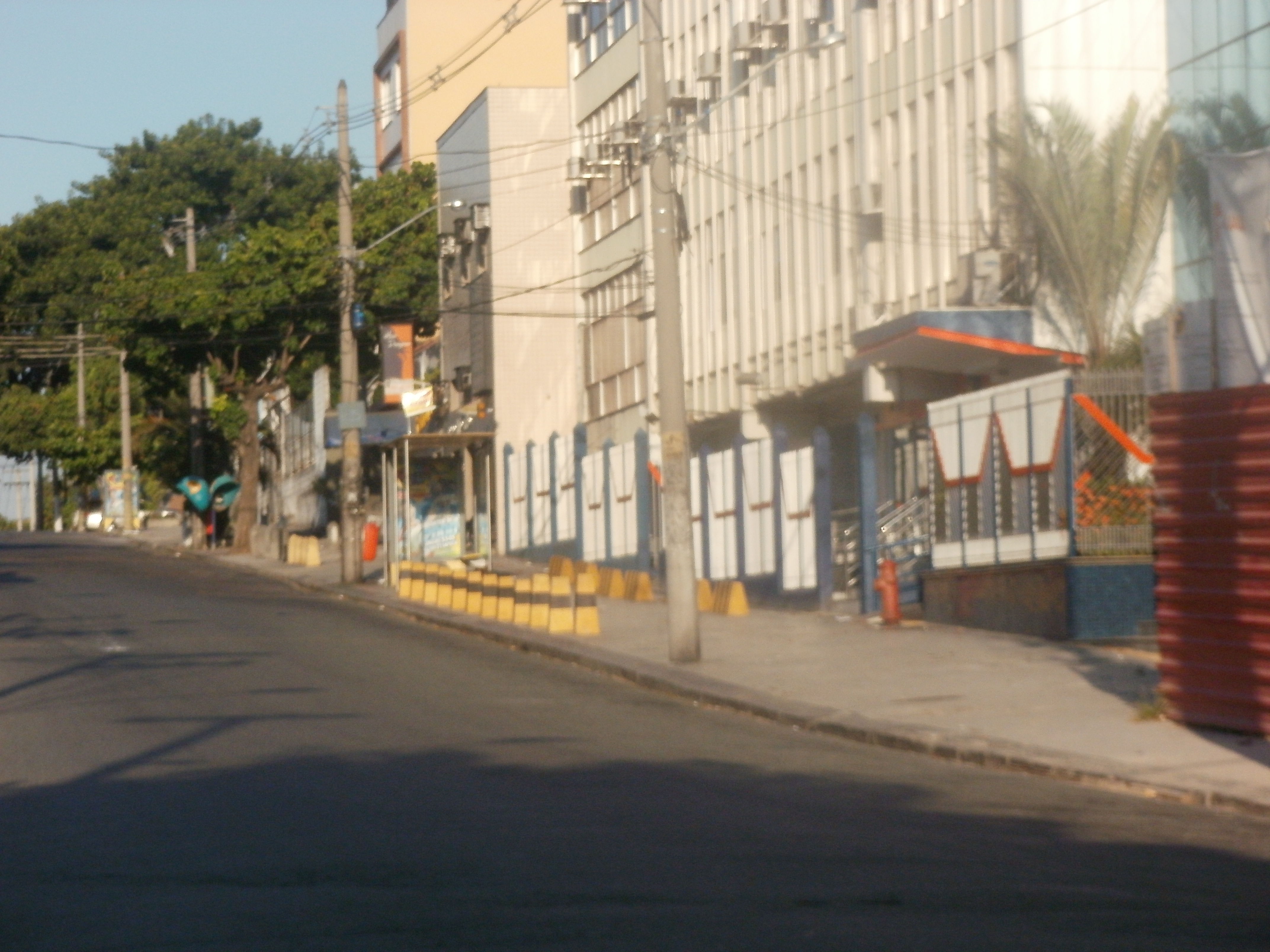 Vista da Avenida Paris, no bairro Bonsucesso, Zona Norte da cidade do Rio de Janeiro, Brasil.